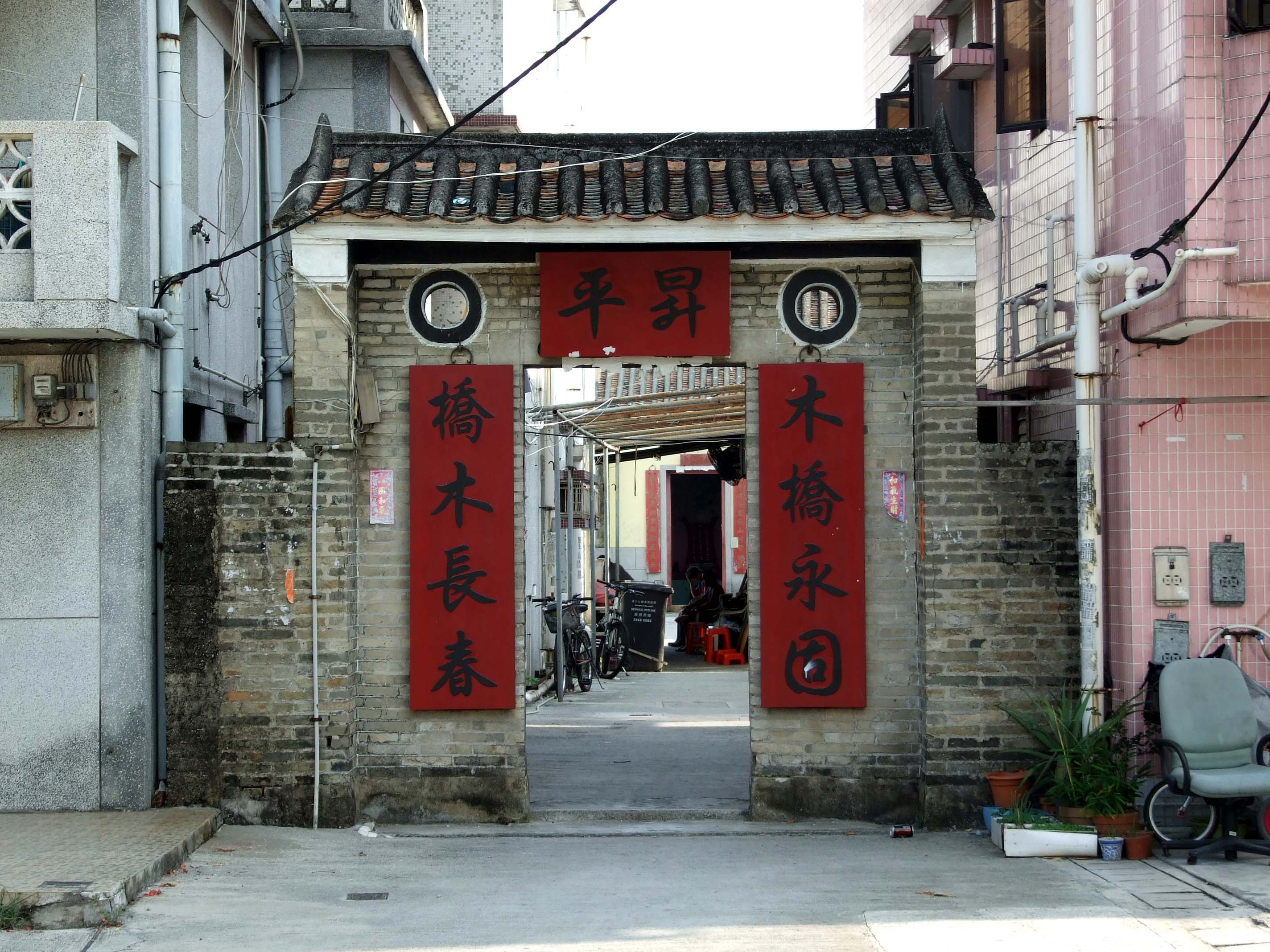 中文（香港）: 朗十八鄉木橋頭村圍門